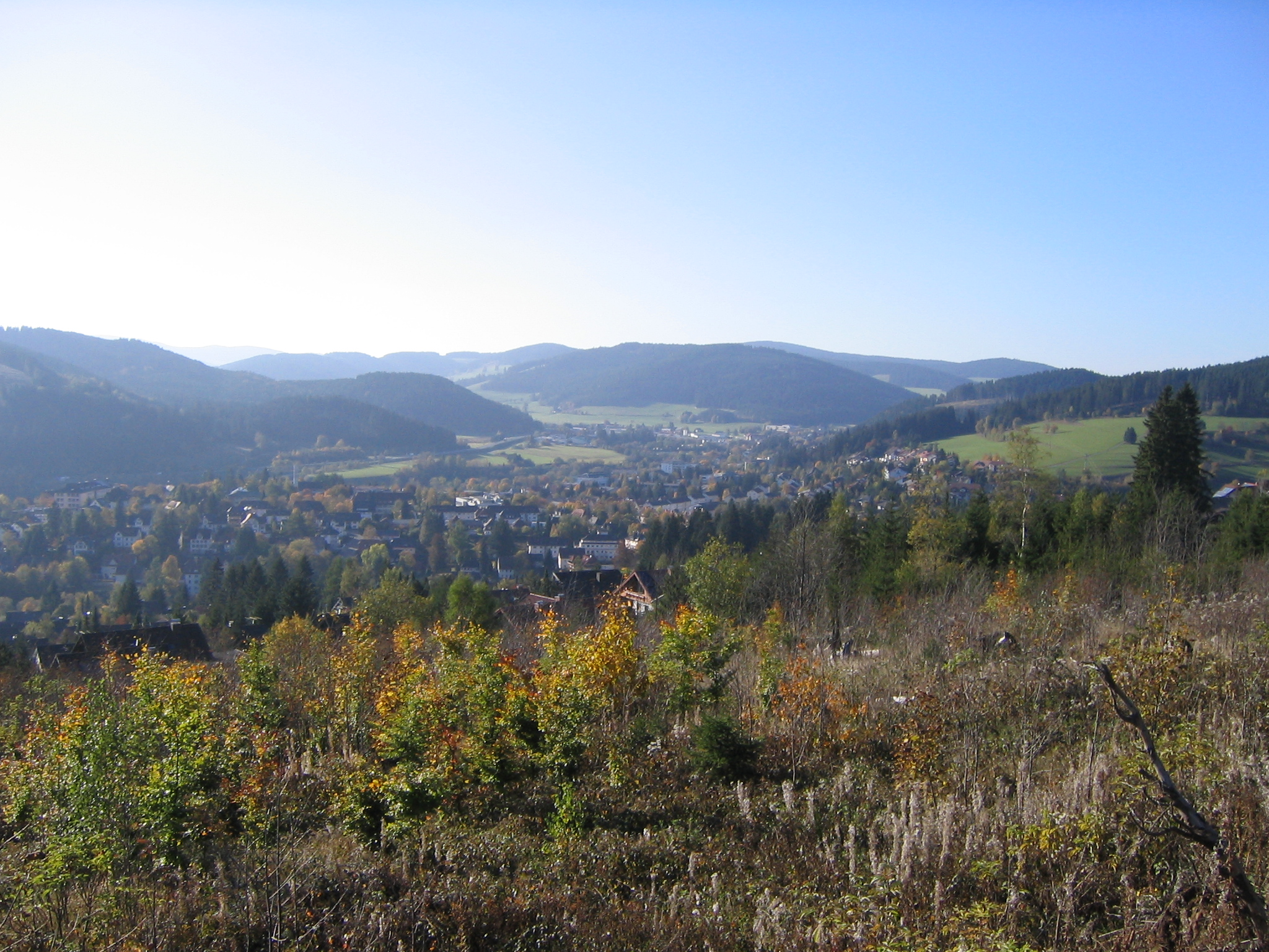 Blick über Neustadt (Titisee-Neustadt, Deutschland) - rechts